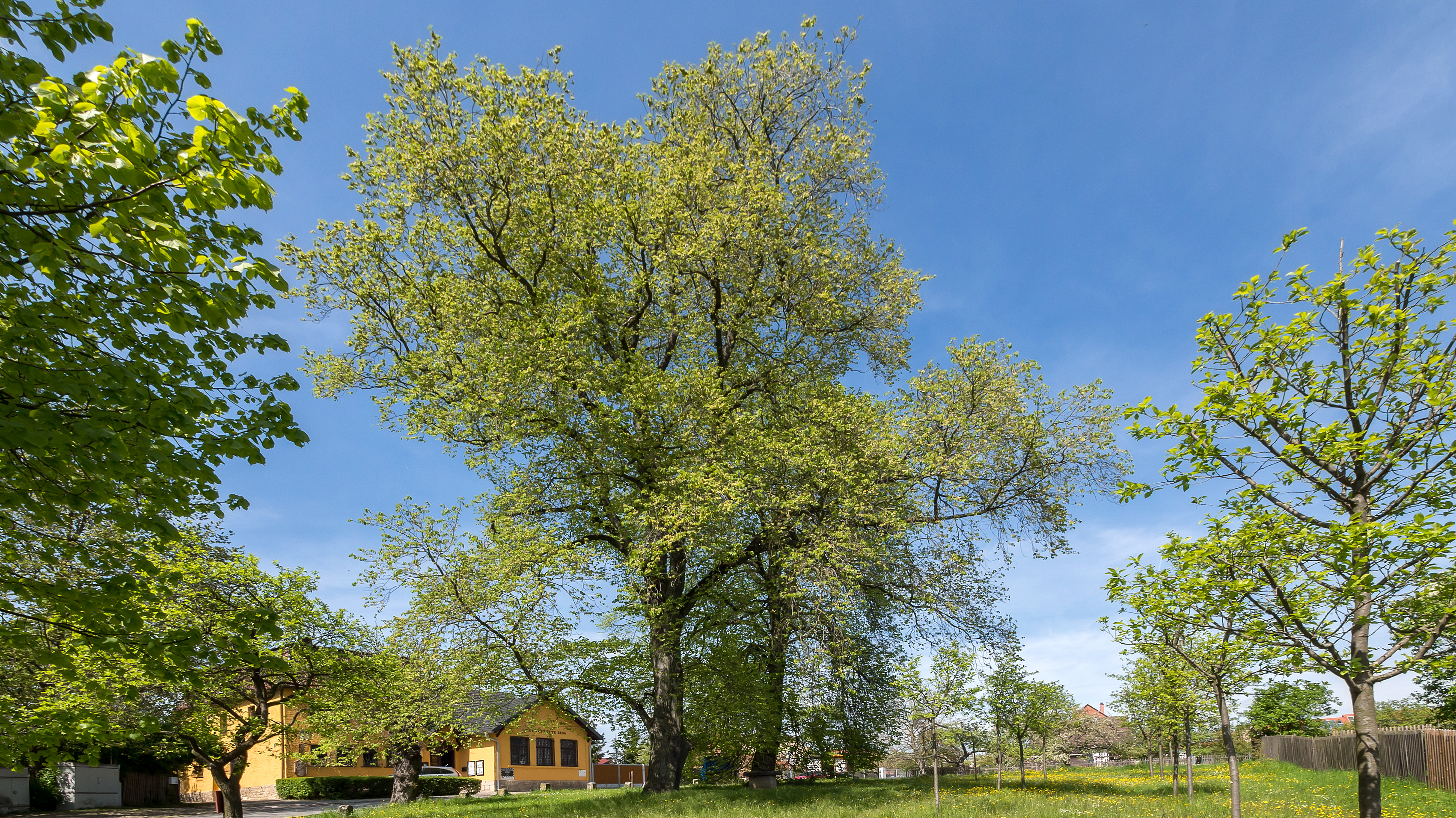 Feldulme Doc.-Nr. 2006-03 Cospeda III